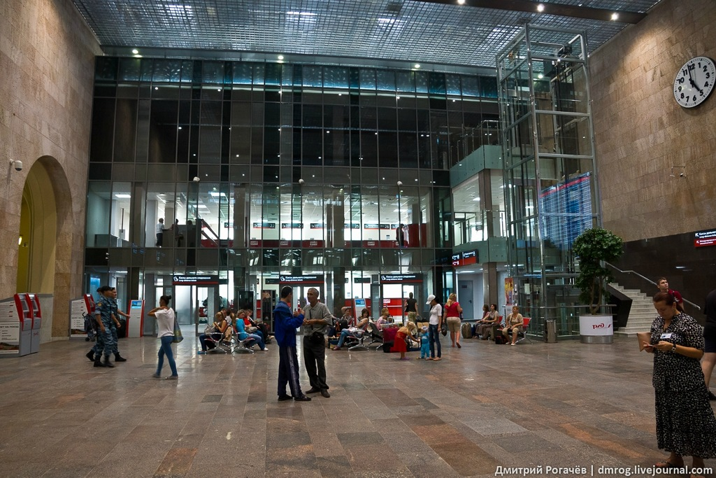 Кассовый зал Ленинградского вокзала Москвы после реконструкции